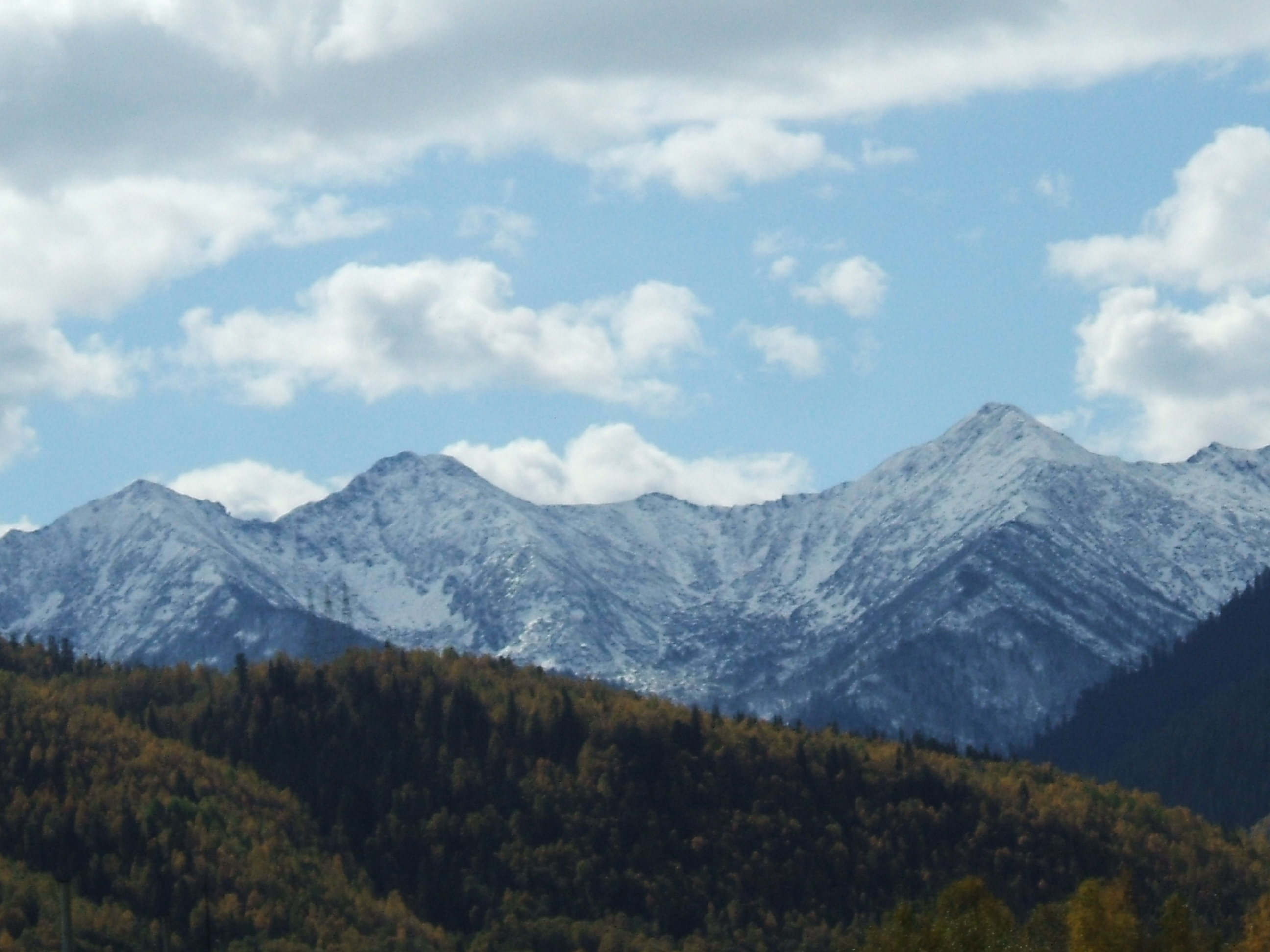 Вид на Хамар-Дабан возле БЦБК